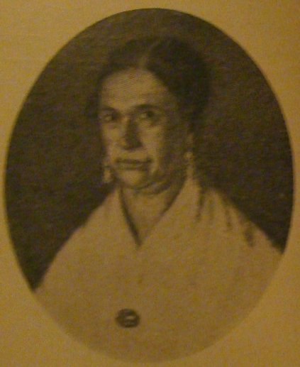 Retrato de Juana del Signo (1787-1869)